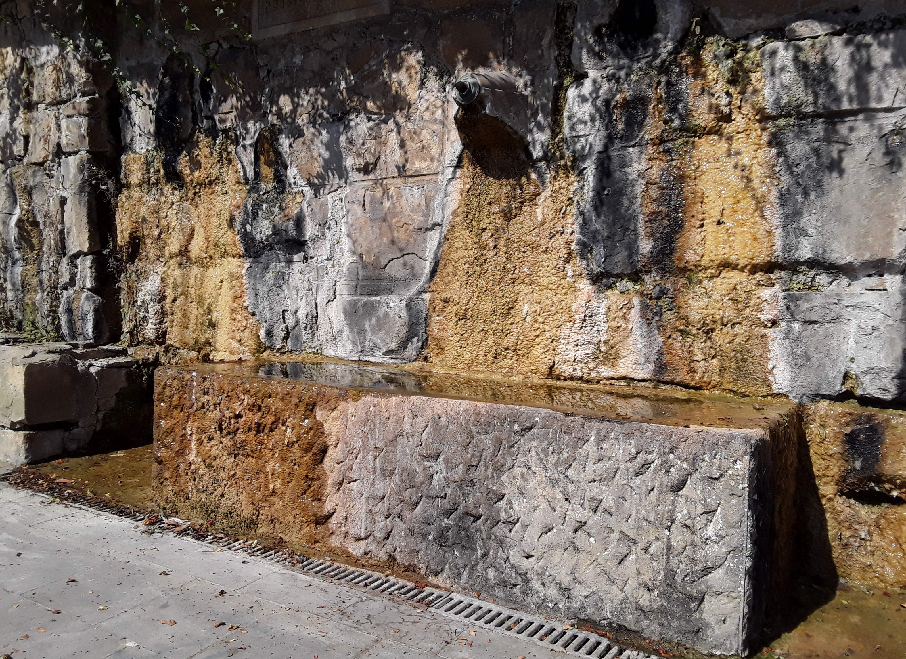 Fontaine "Fetschebur" (Fetschenbour) à la rue des Pommiers à Luxembourg, Cents